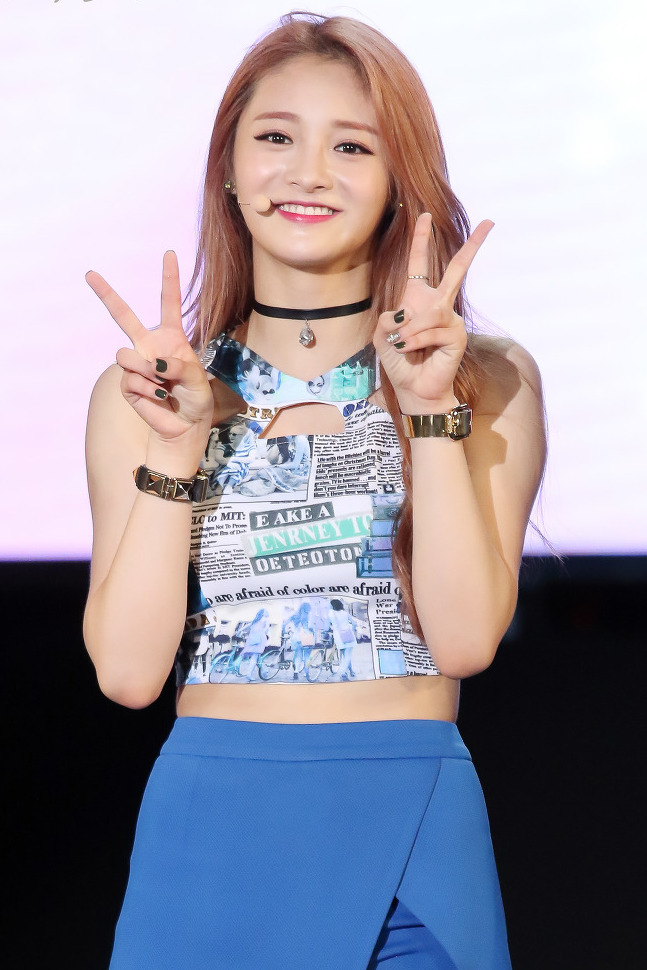 한국어 (조선): 160904 시청 태권도 평화콘서트 주결경